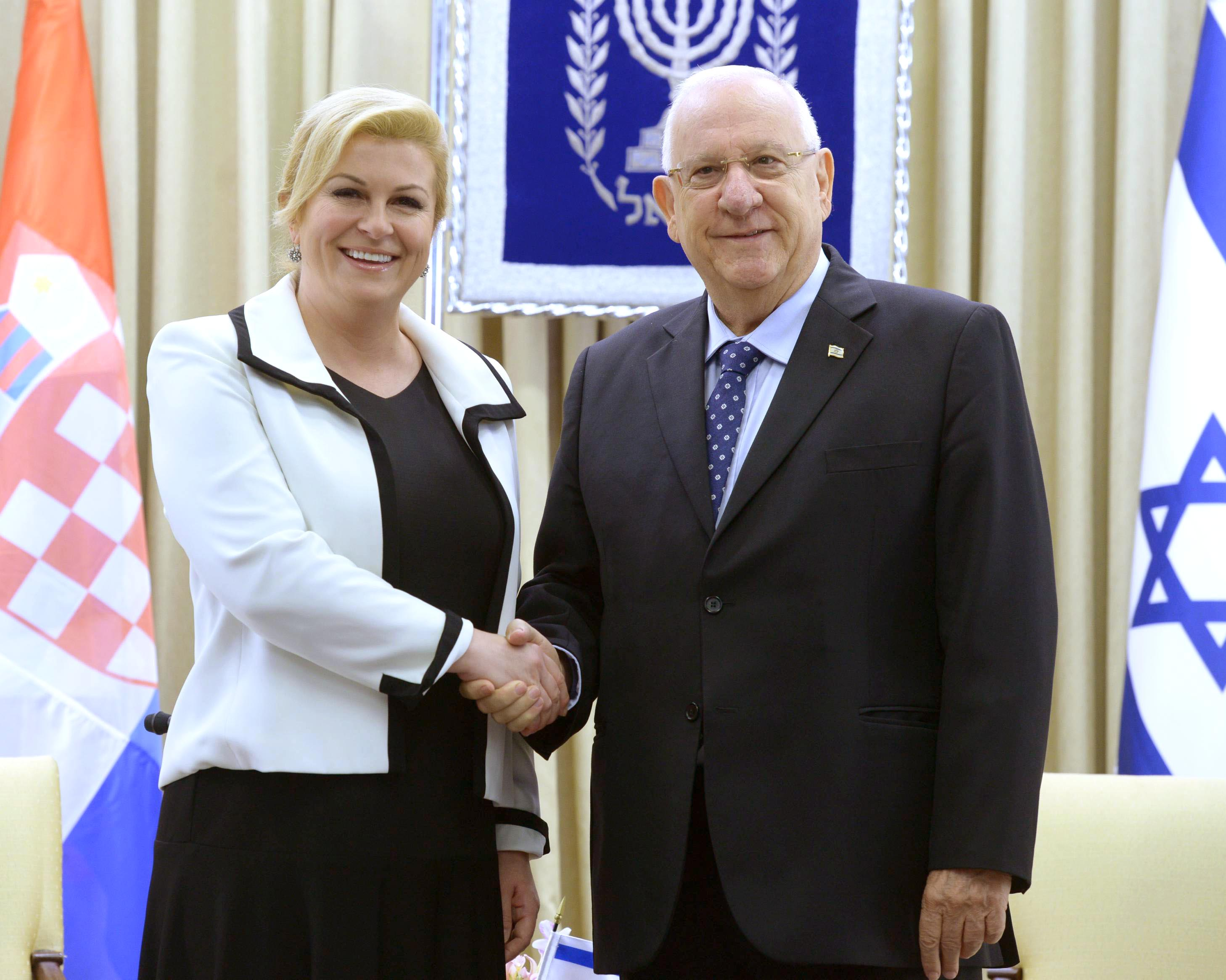 קולינדה גרבר-קיטרוביץ' נשיאת קרואטיה בביקור בישראל ביחד עם נשיא מדינת ישראל ראובן ריבלין